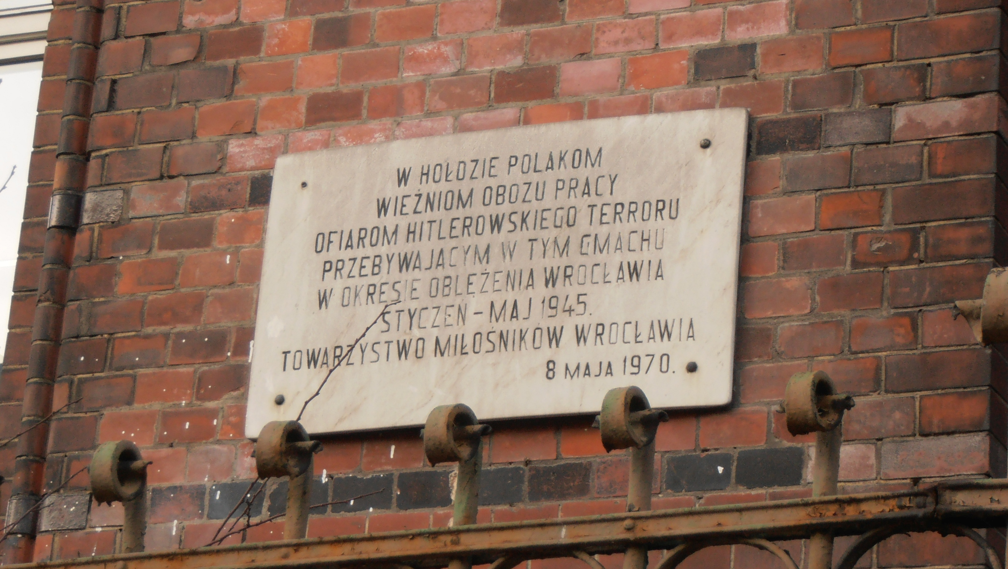 Wrocław, ul. Swobodna. Tablica na budynku Centrum Kształcenia Ustawicznego. Treść: W hołdzie Polakom wieźniom obozu pracy ofiarom hitlerowskiego terroru przebywającym w tym gmachu w okresie oblężenia Wrocławia styczeń – maj 1945. Towarzystwo Miłośników Wrocławia. 8 maja 1970.